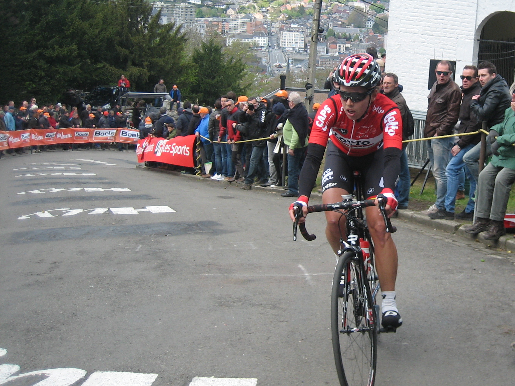 Annelies Dom (Lotto Soudal Ladies) in de Waalse Pijl 2017